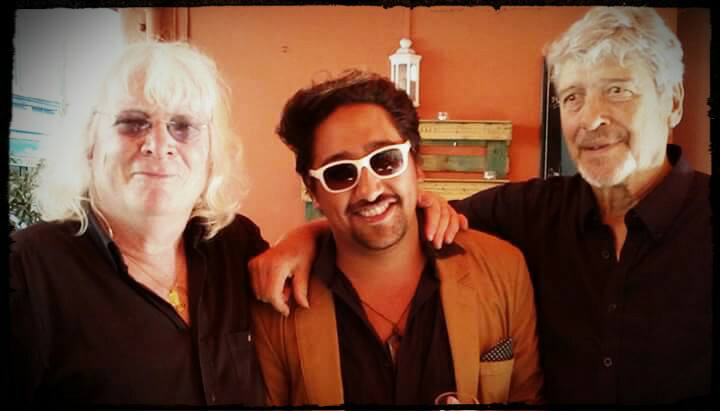 Les chanteurs Gilles Dreu, Bichou et Ponpon lors des virades de l'espoir 2017 en Ardèche.